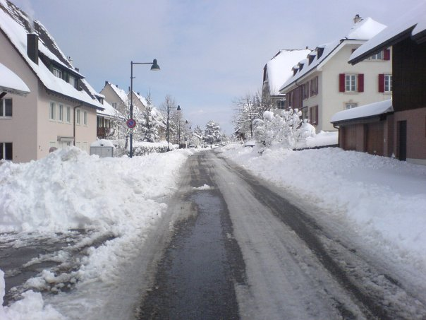 Baselstrasse, Schönenbuch